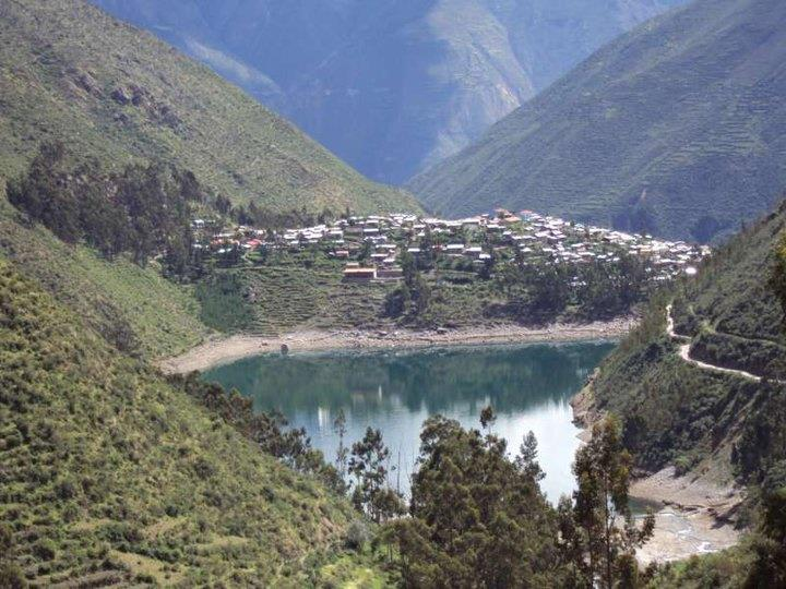 Distrito de Laraos en la provincia de Yauyos.